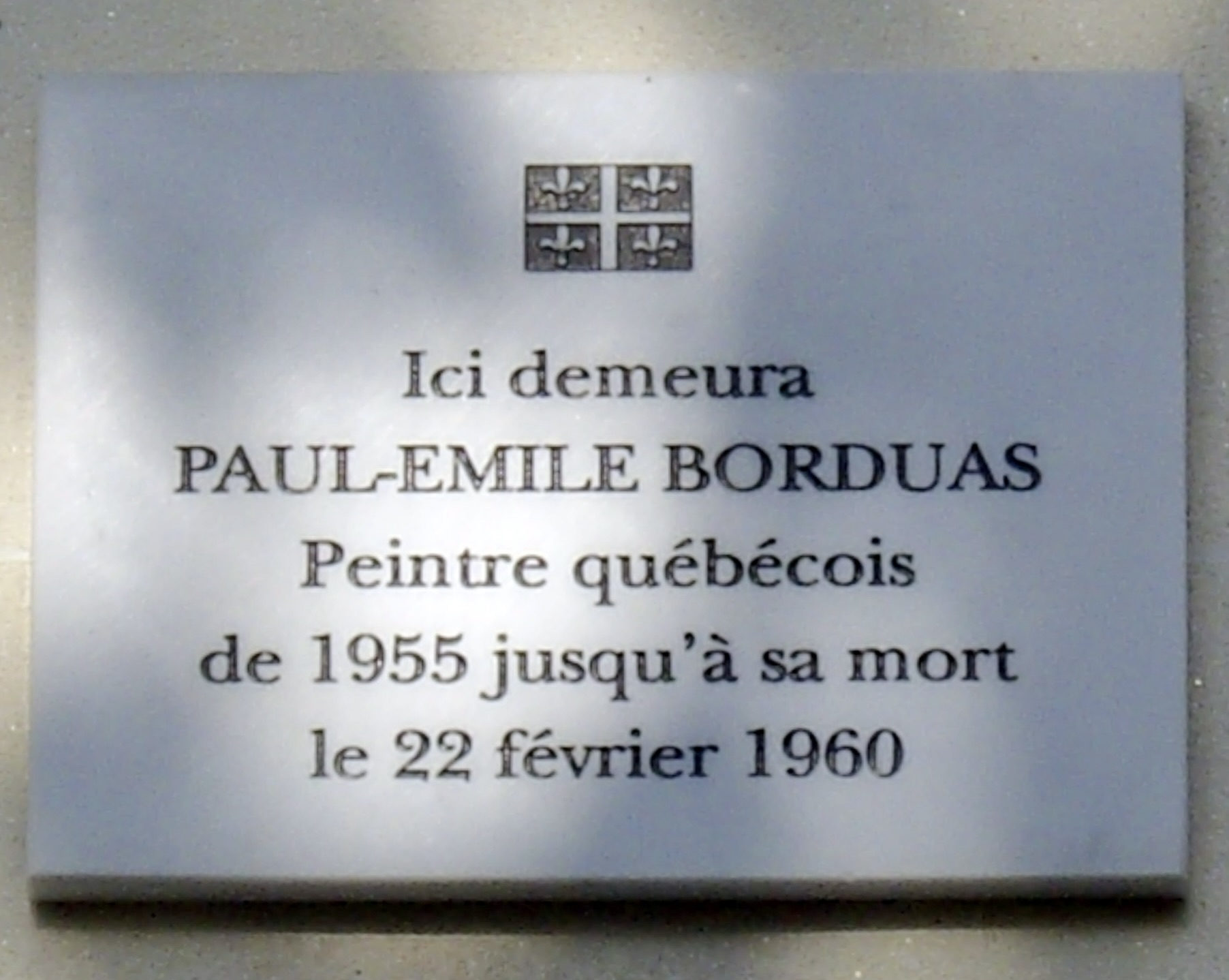 Plaque apposée au n° 19 de la rue Rousselet, Paris 7e, où habita le peintre Paul-Émile Borduas (1905-1960) de 1955 à sa mort le 22 février 1960.